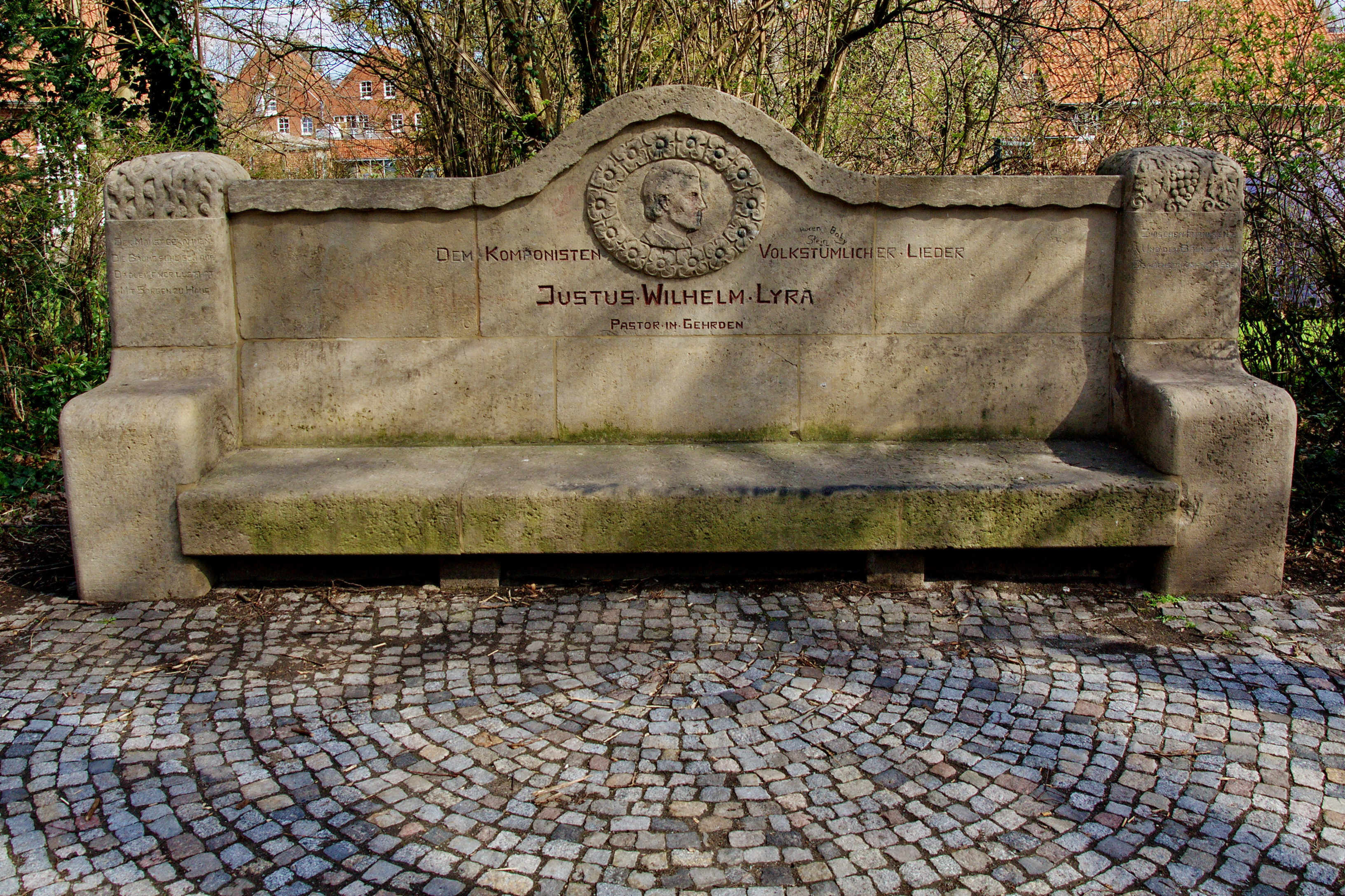 Gedenkbank an Justus Wilhelm Lyra in Gehrden, Niedersachsen, Deutschland